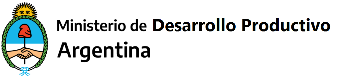 Ministerio de Desarrollo Productivo